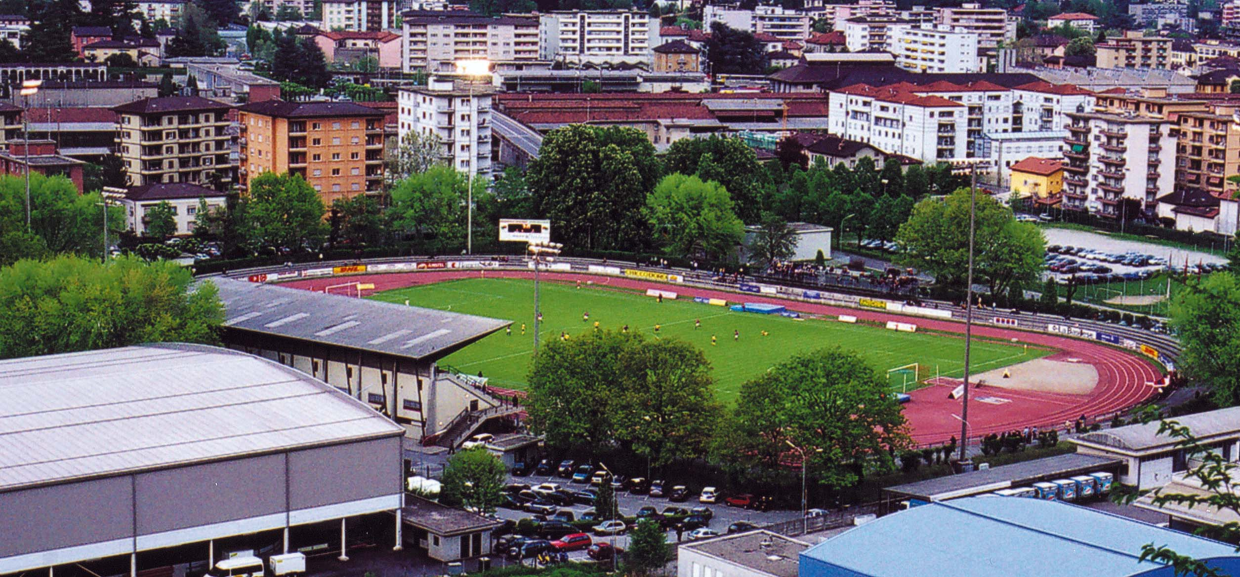 Stadio Comunale di Chiasso ripreso nell'aprile 2004.